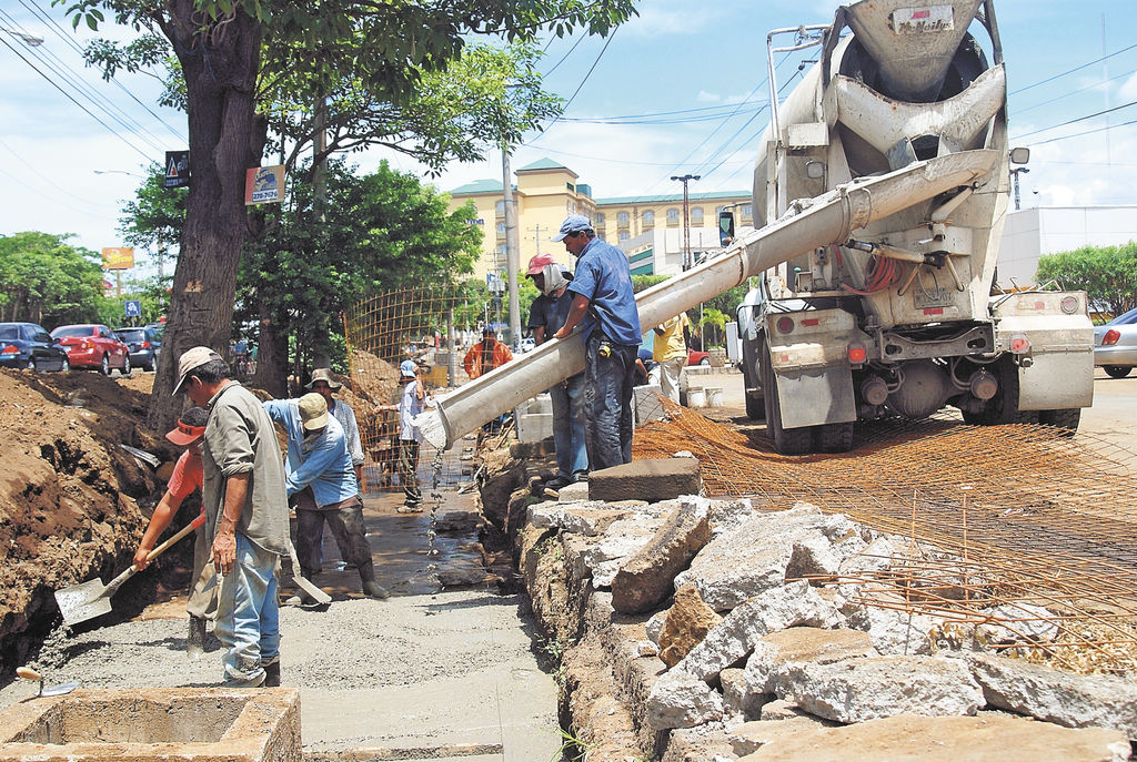 Obreros construyendo el Paseo